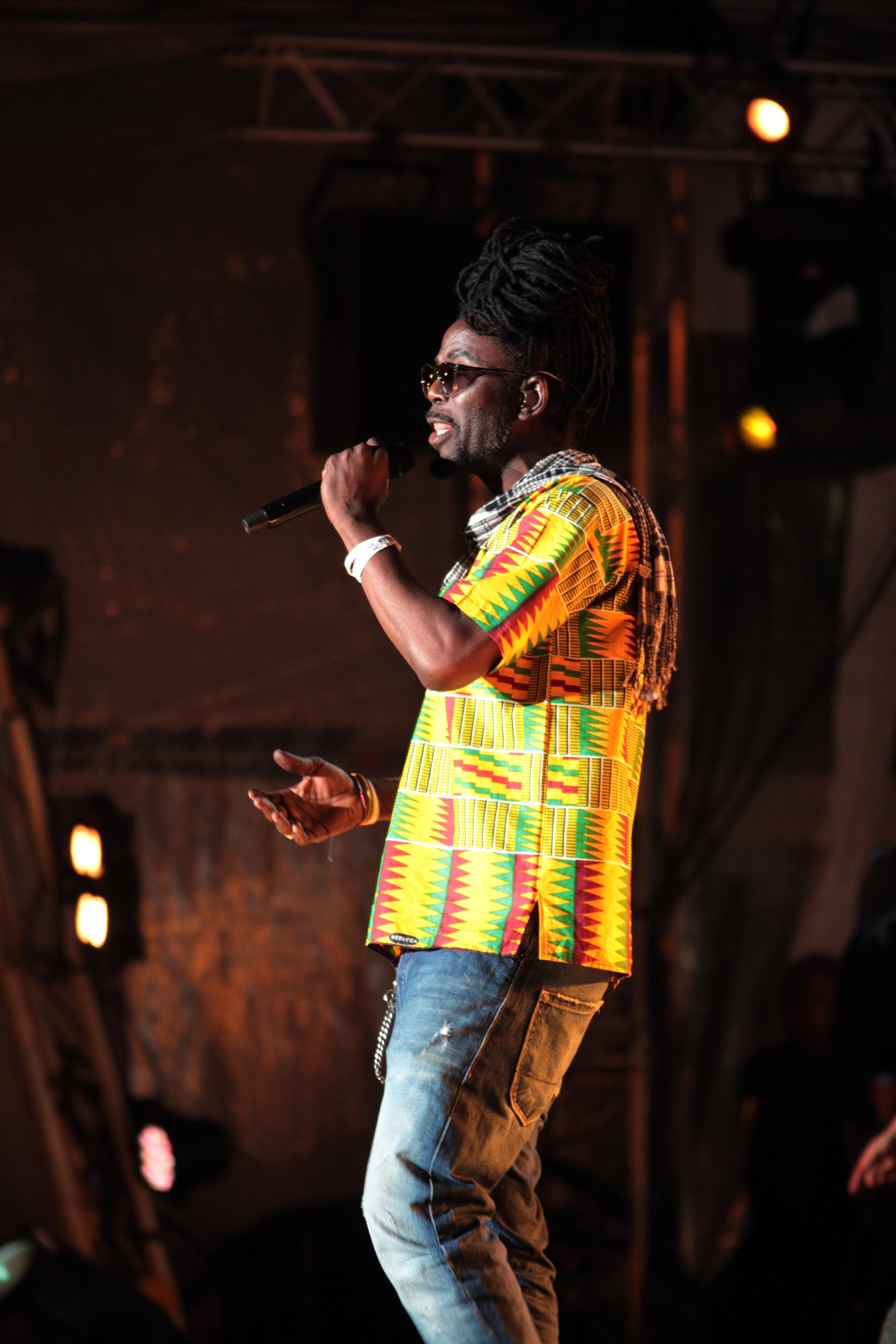 Kenny B I